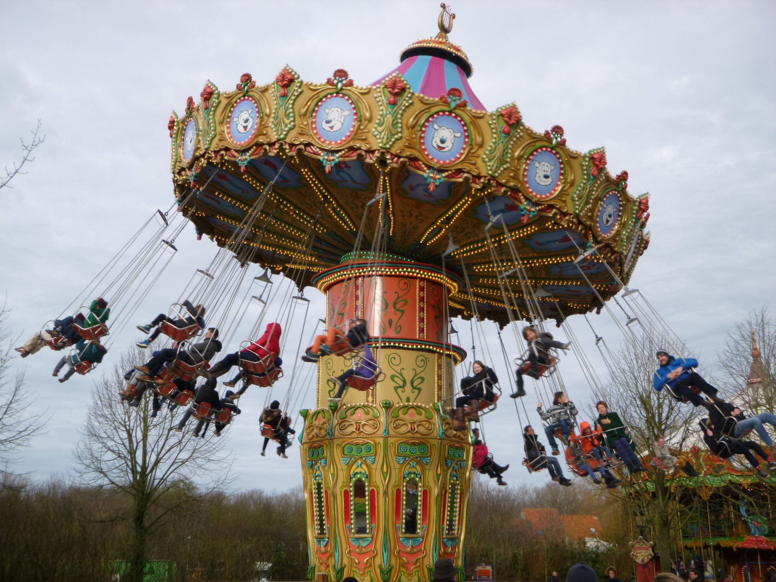 Wienerwalz à Plopsaland